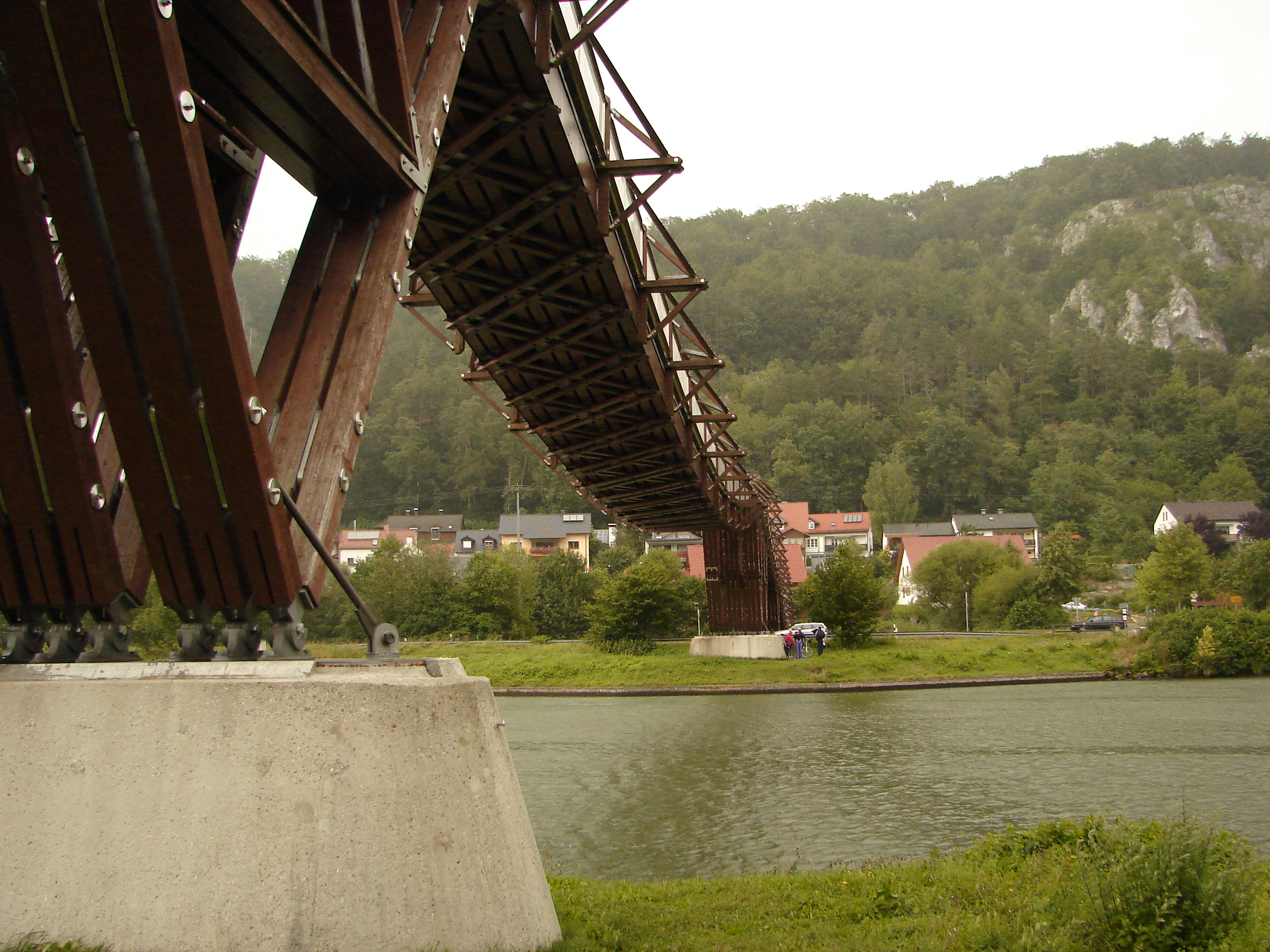 Holzbrücke an der Almühl